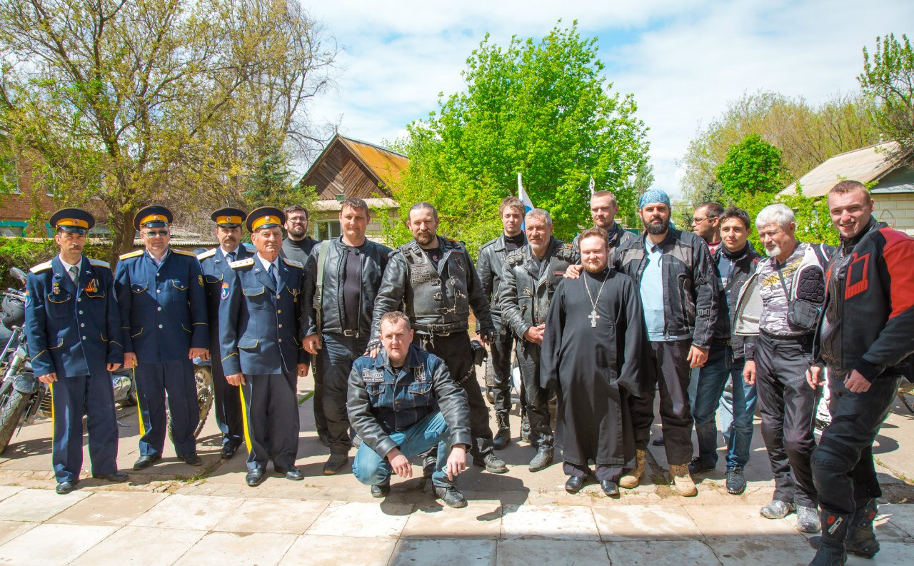 участники мотопробега "Мы - наследники Великой Победы"